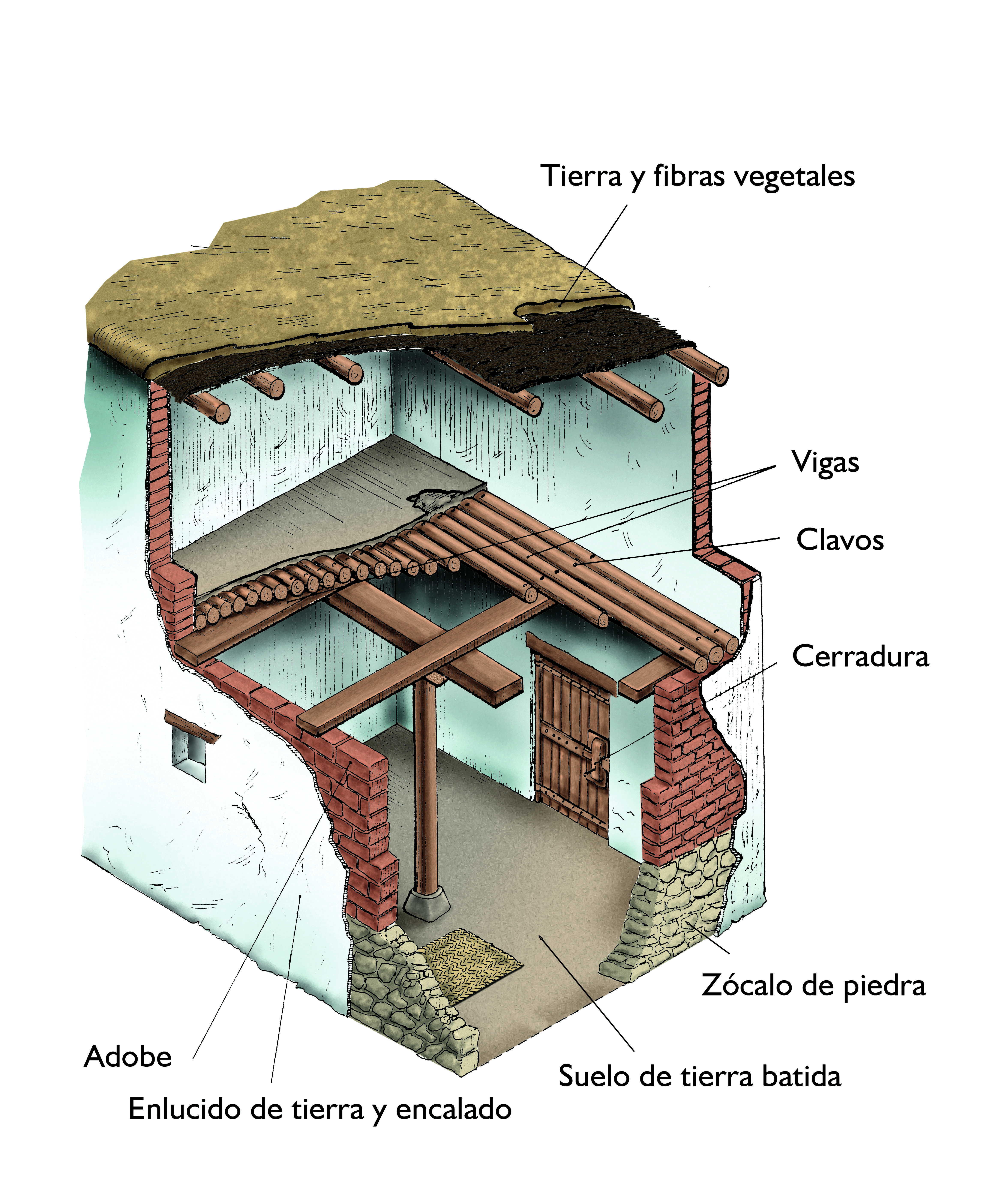 Reconstrucción de vivienda ibérica. (F. Chiner)